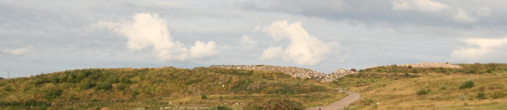 Vuosaaren huippu